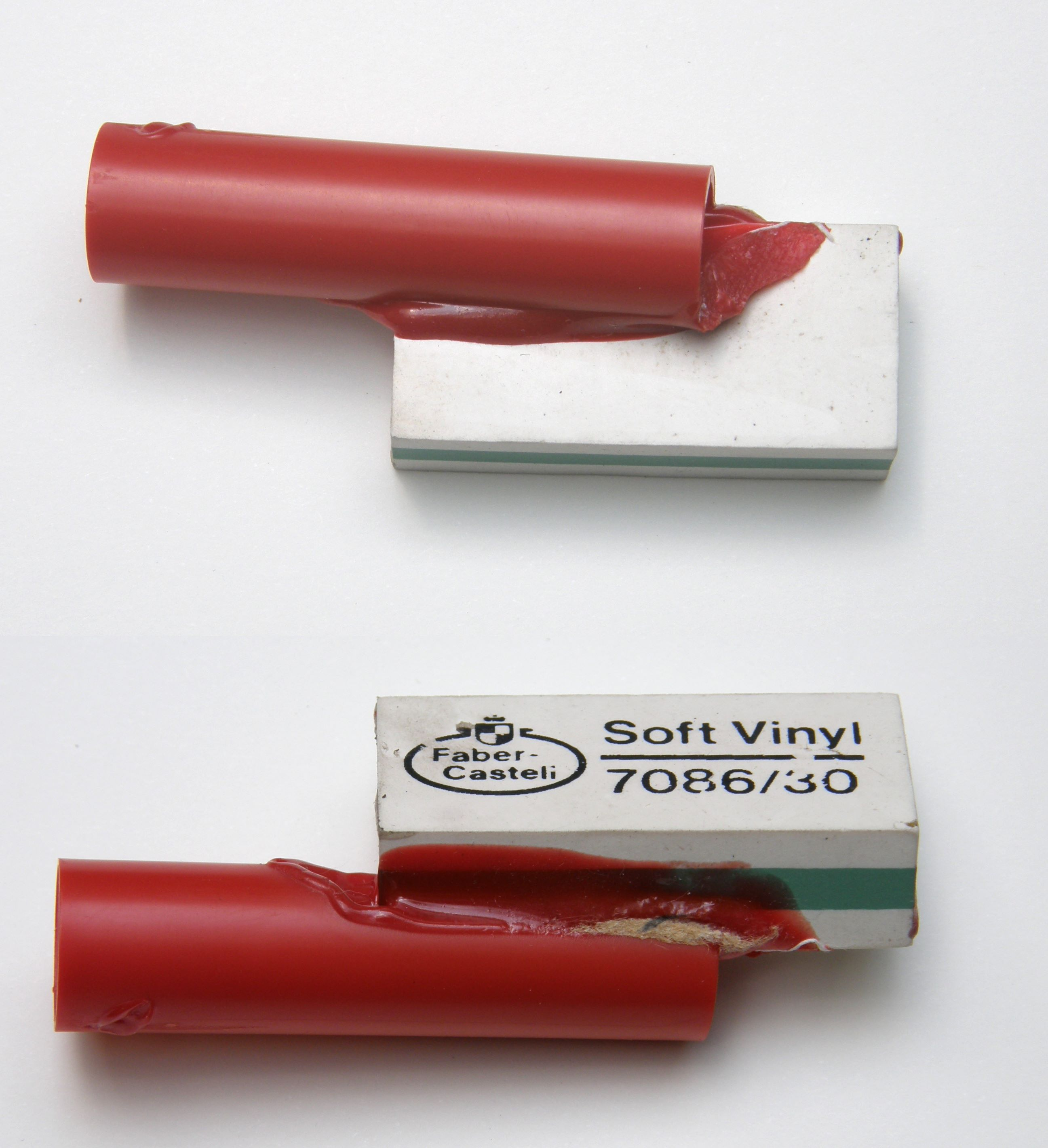 Der Radiergummi lag mehrere Jahre vergessen im Keller in einer Kiste. (keine Hitzeeinwirkung!) Der im Radiergummi enthaltene Weichmacher löste das daraufliegende Kunststoffröhren soweit an, dass es sich langsam verformte, wie wenn es geschmolzen wäre.